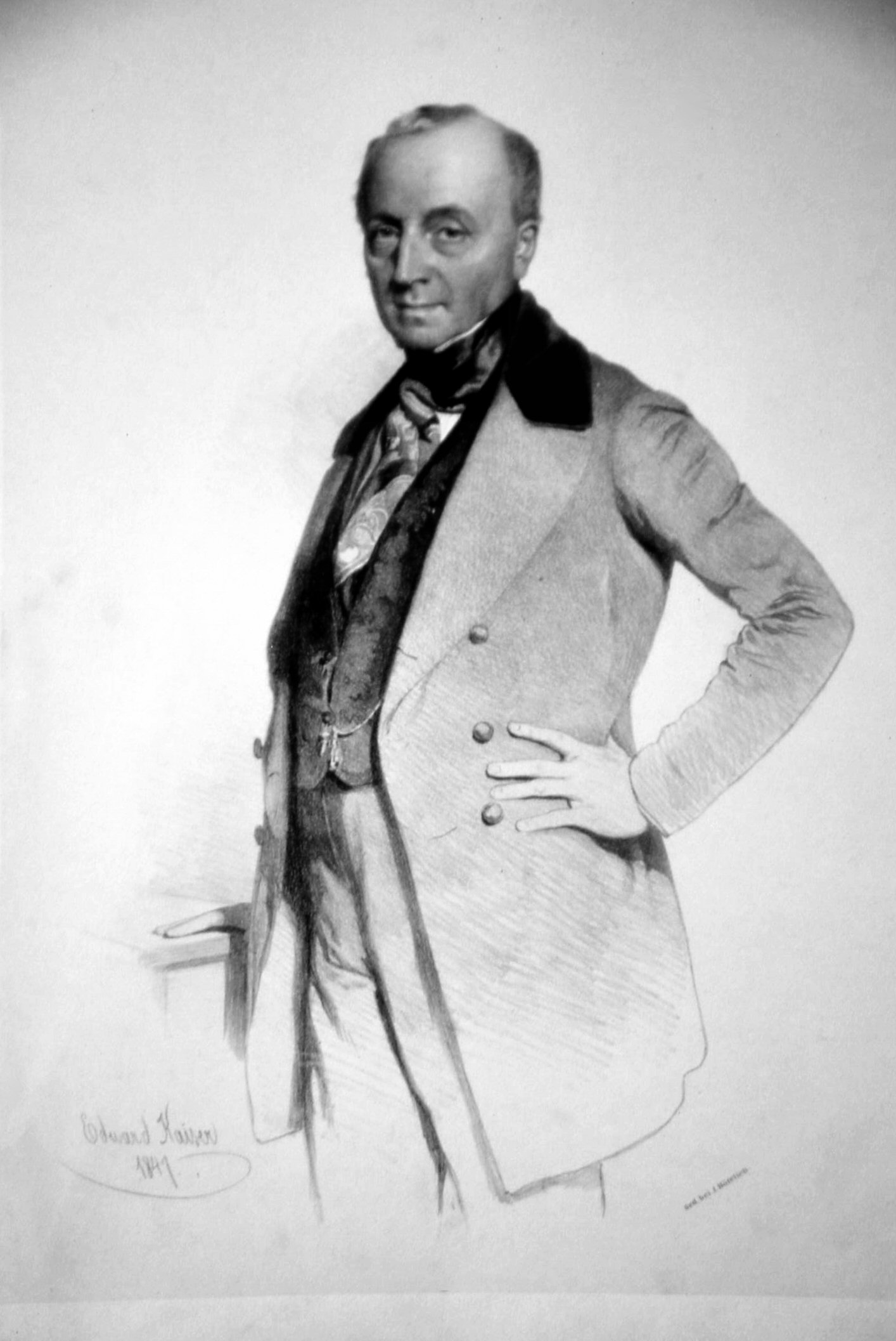 Ferdinand Georg Waldmüller (1793-1865) österreichischer Maler, Lithographie von Eduard Kaiser, 1847.